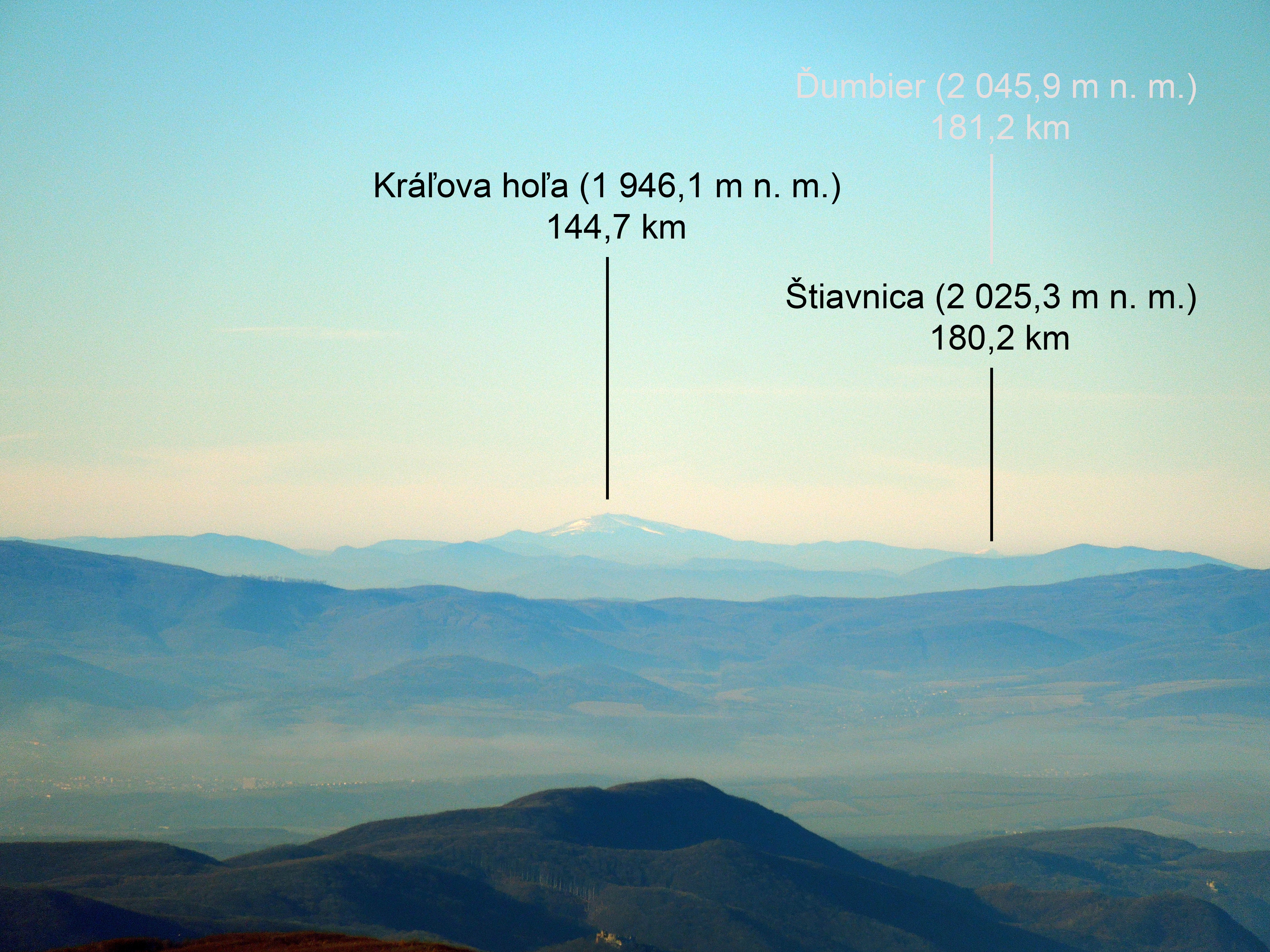 Pohľad na vrchy Nízkych Tatier – Kráľovu hoľu, 180,2 km vzdialenú Štiavnicu a 181,2 km? vzdialený Ďumbier? z východného vrcholu Vihorlatu (Pohľad z Vihorlatu na masív Ďumbiera patrí medzi najvzdialenejšie vnútroštátne výhľady v rámci územia Slovenska)[1][2]